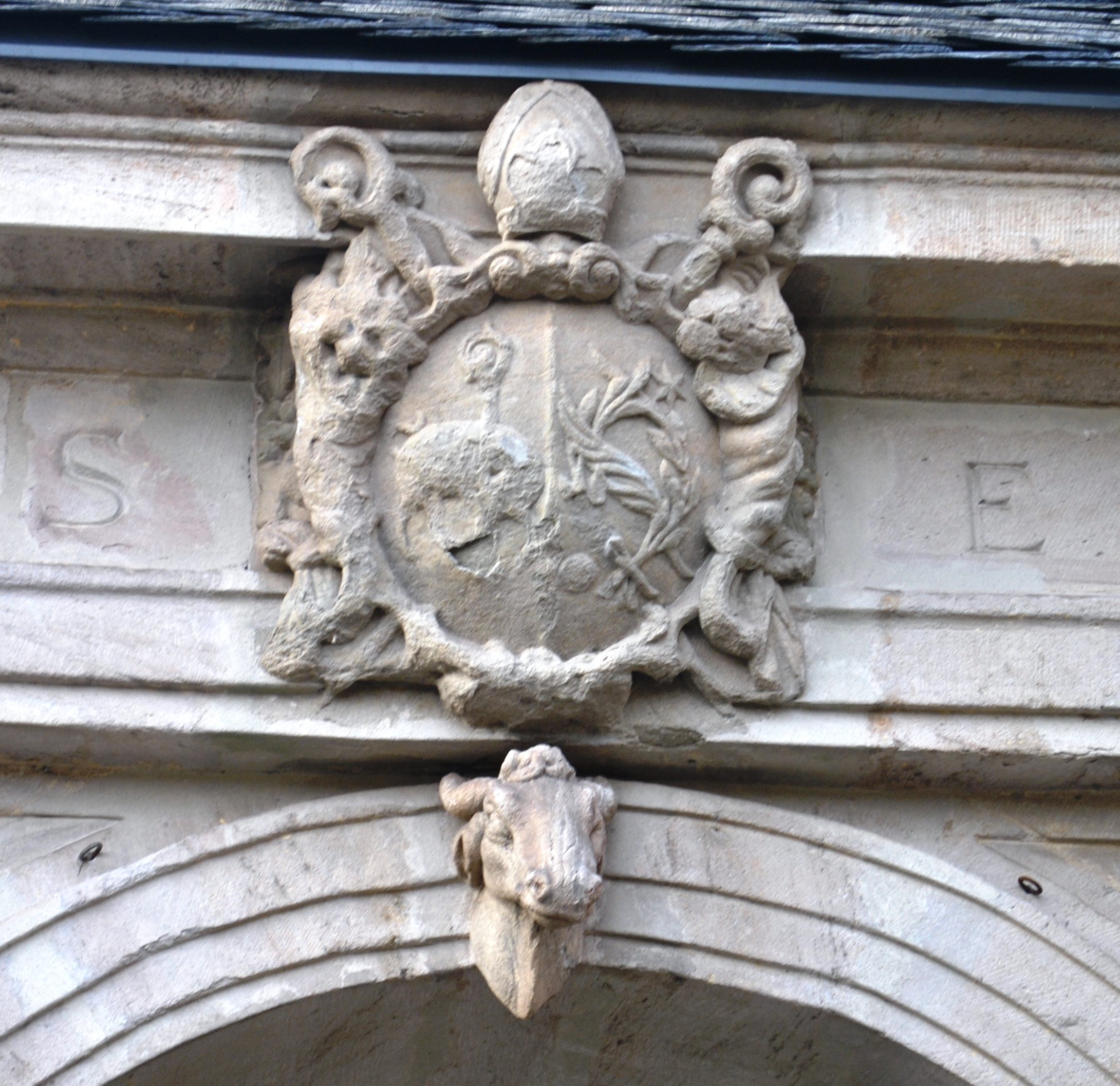 Blutbrunnen Burgwindheim, Wappen des Abtes Ludwig Ludwig von Ebrach